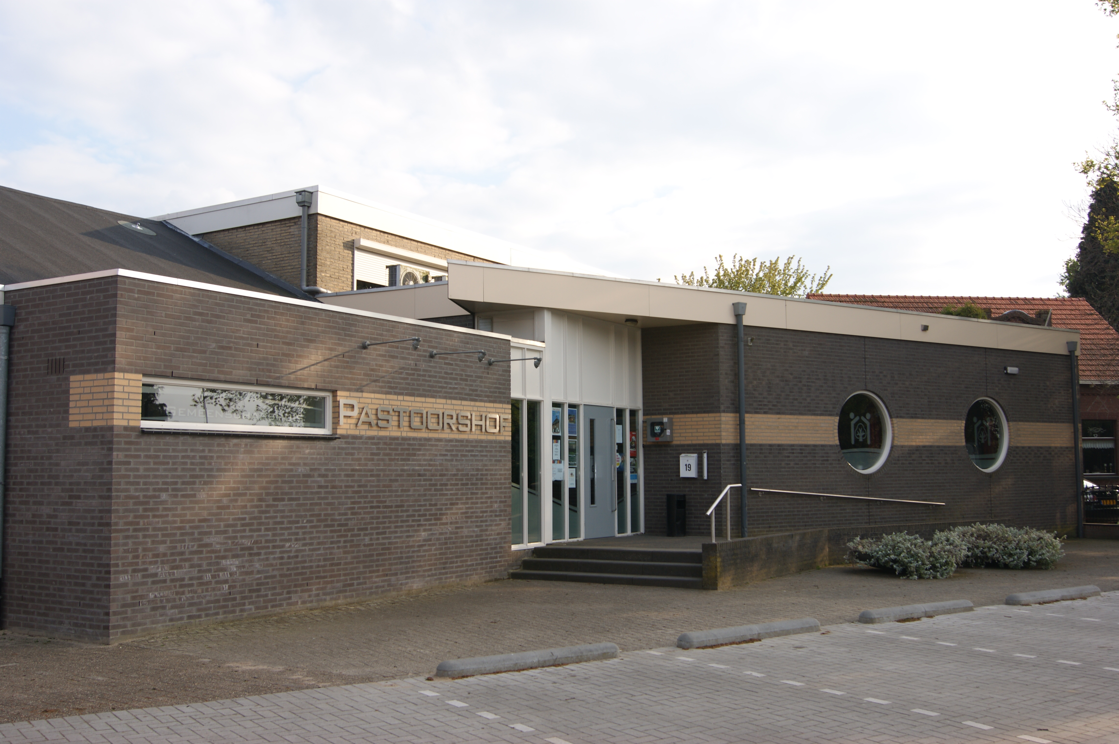 Voorkant